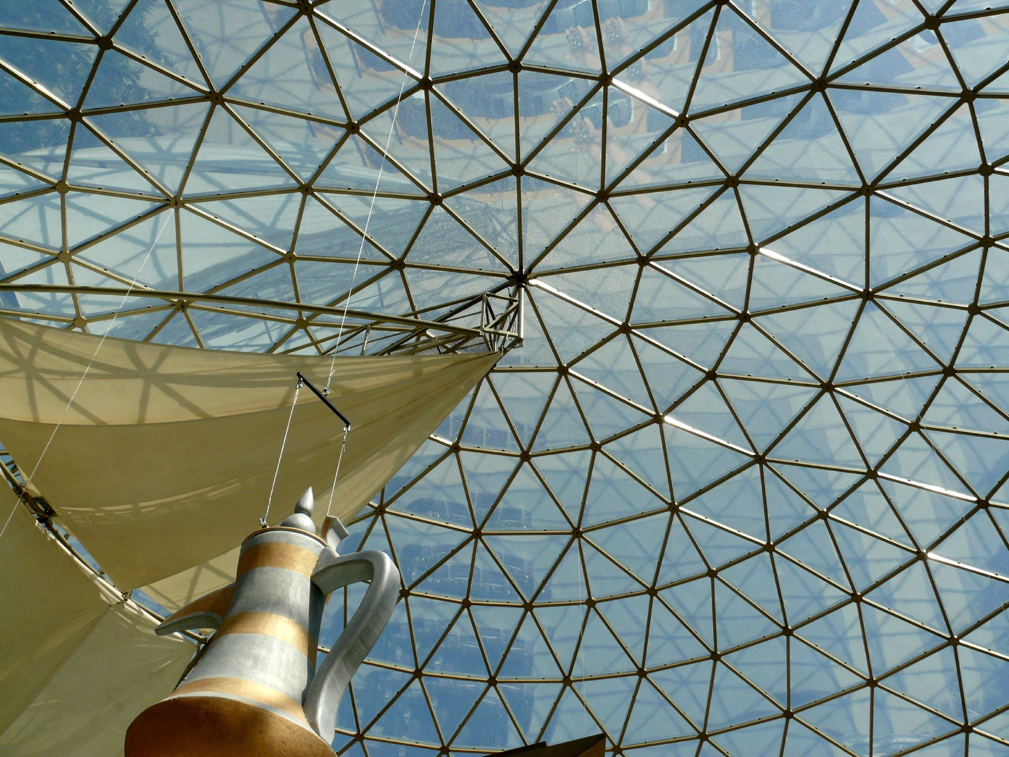 the marina mall in kuwait